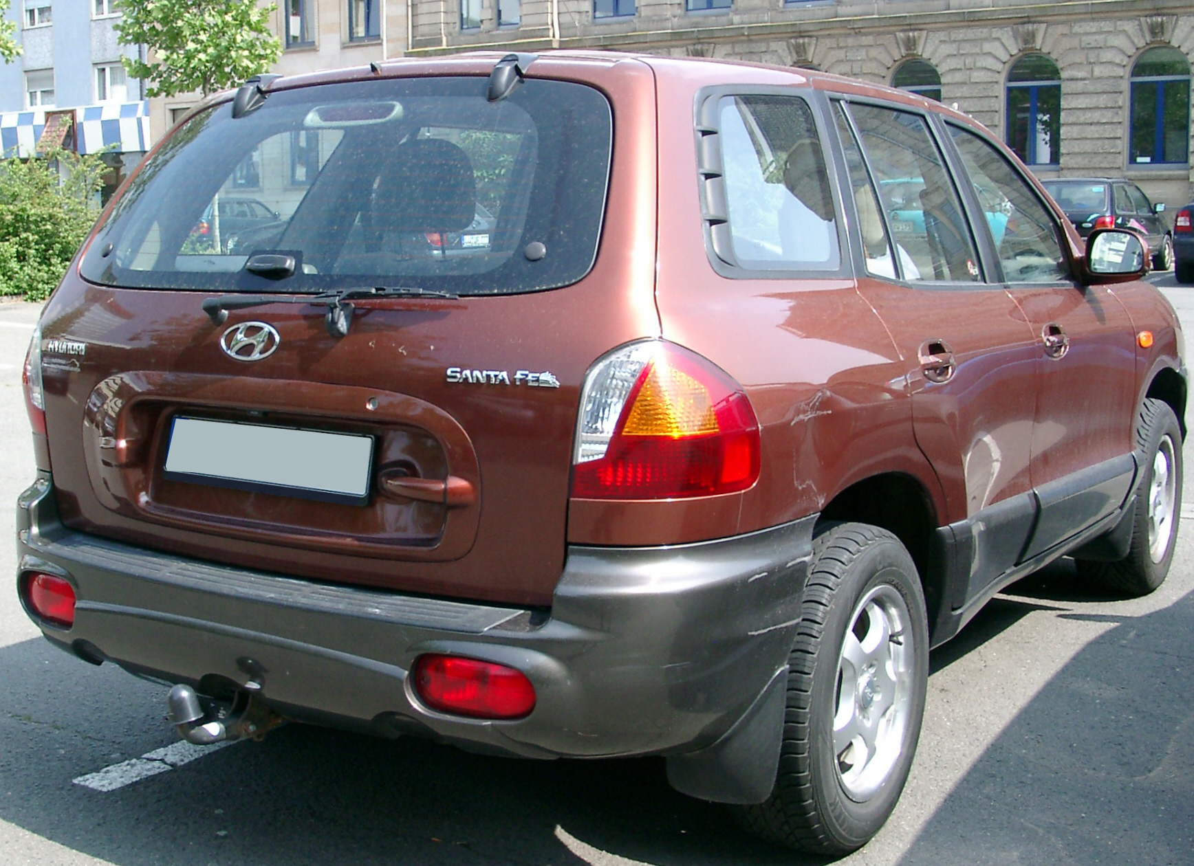 Hyundai Santa Fe